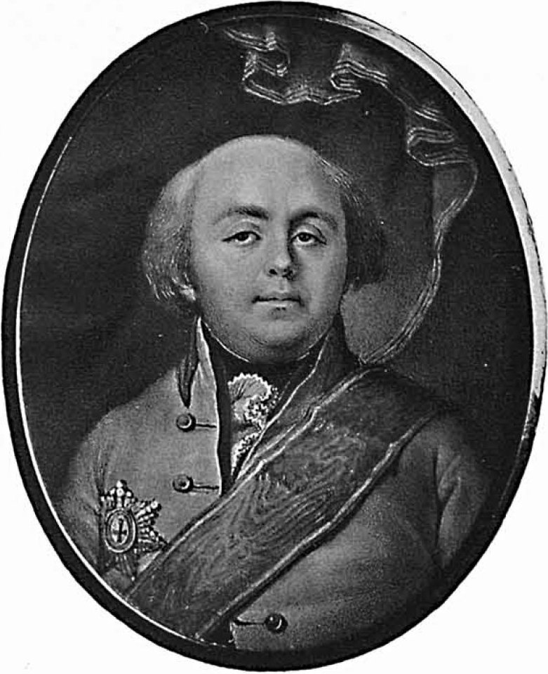 Граф Алексей Григорьевич Бобринский (1762-1813)